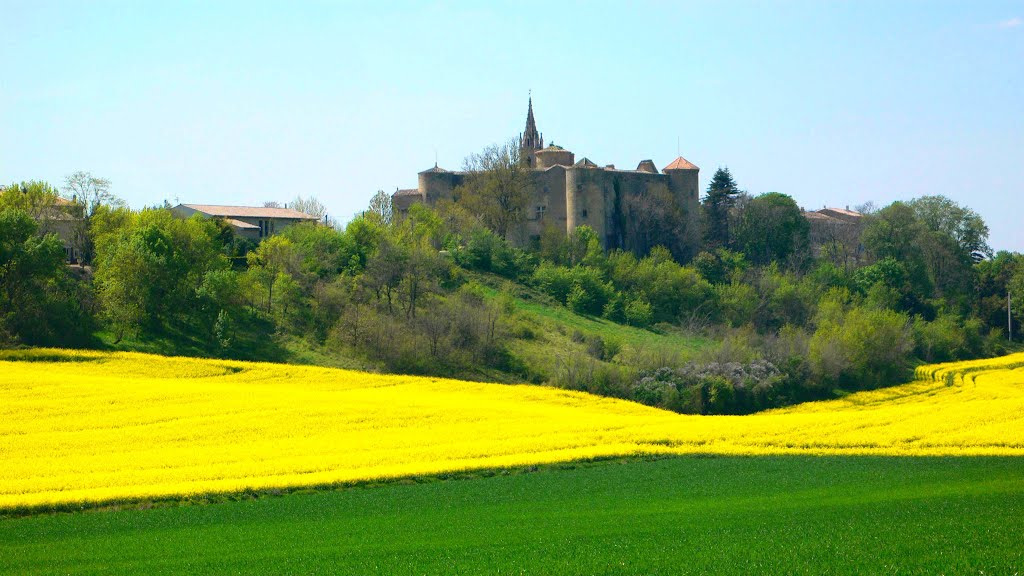 Vue du château de Montmaur depuis la colline des 3 moulins. (11320)